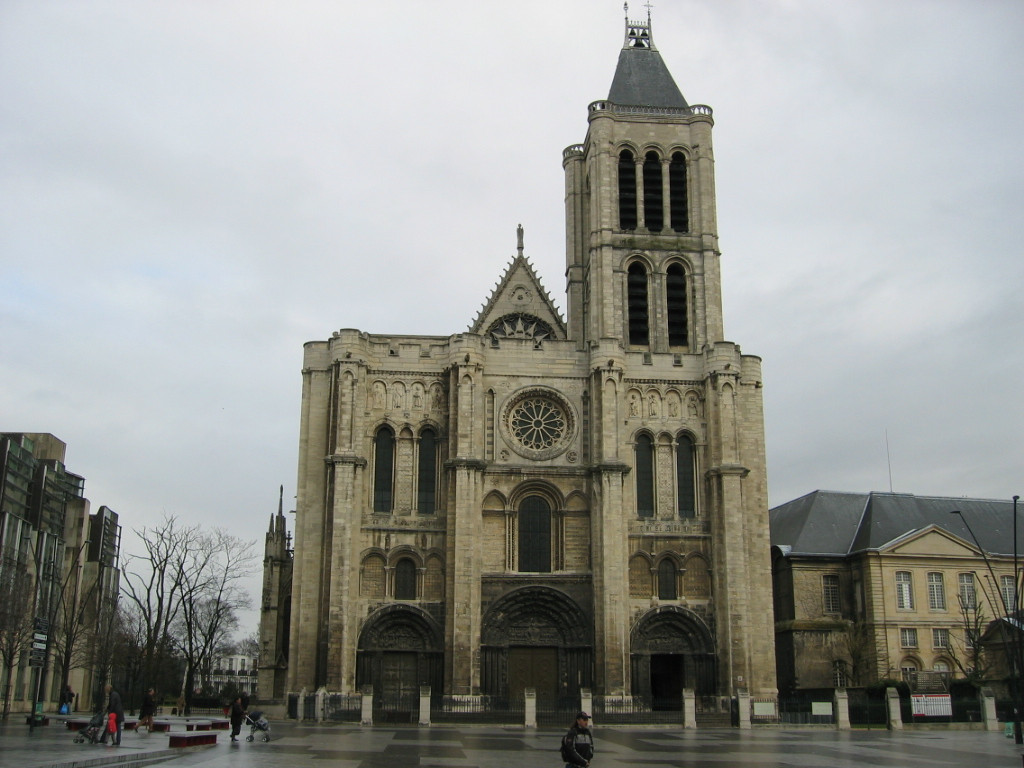 Basilique Saint Denis de Saint-Denis 93